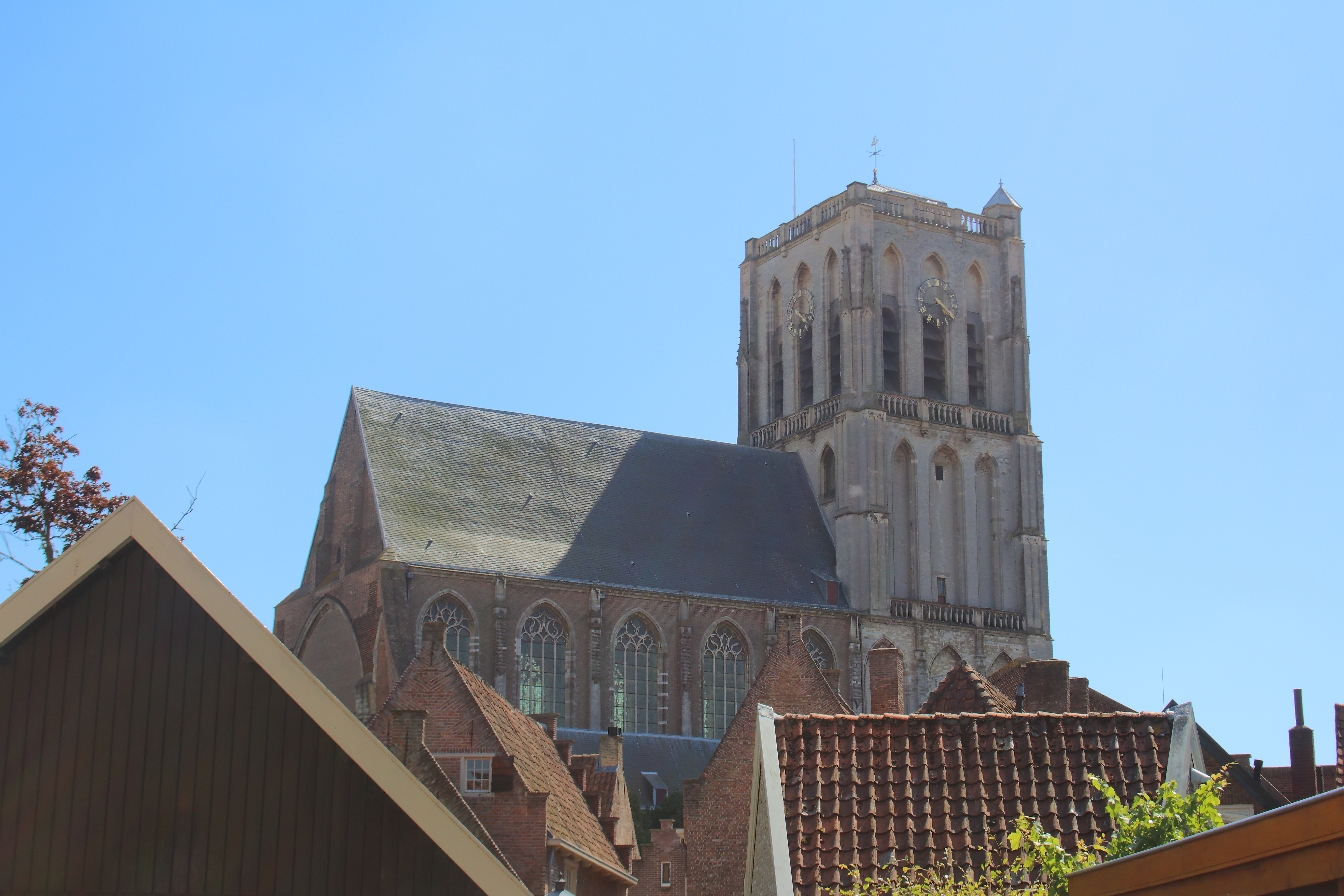 Brielle, Zuid-Holland, Nederland